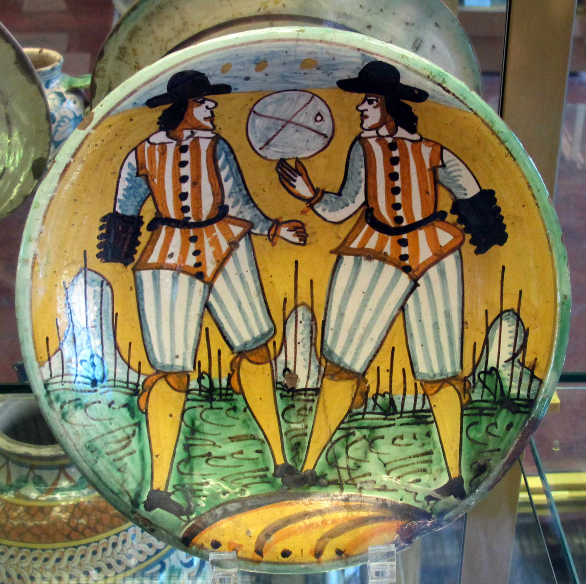 Montelupo, piatto con gioco del pallone col bracciale, 1600-1650 ca.